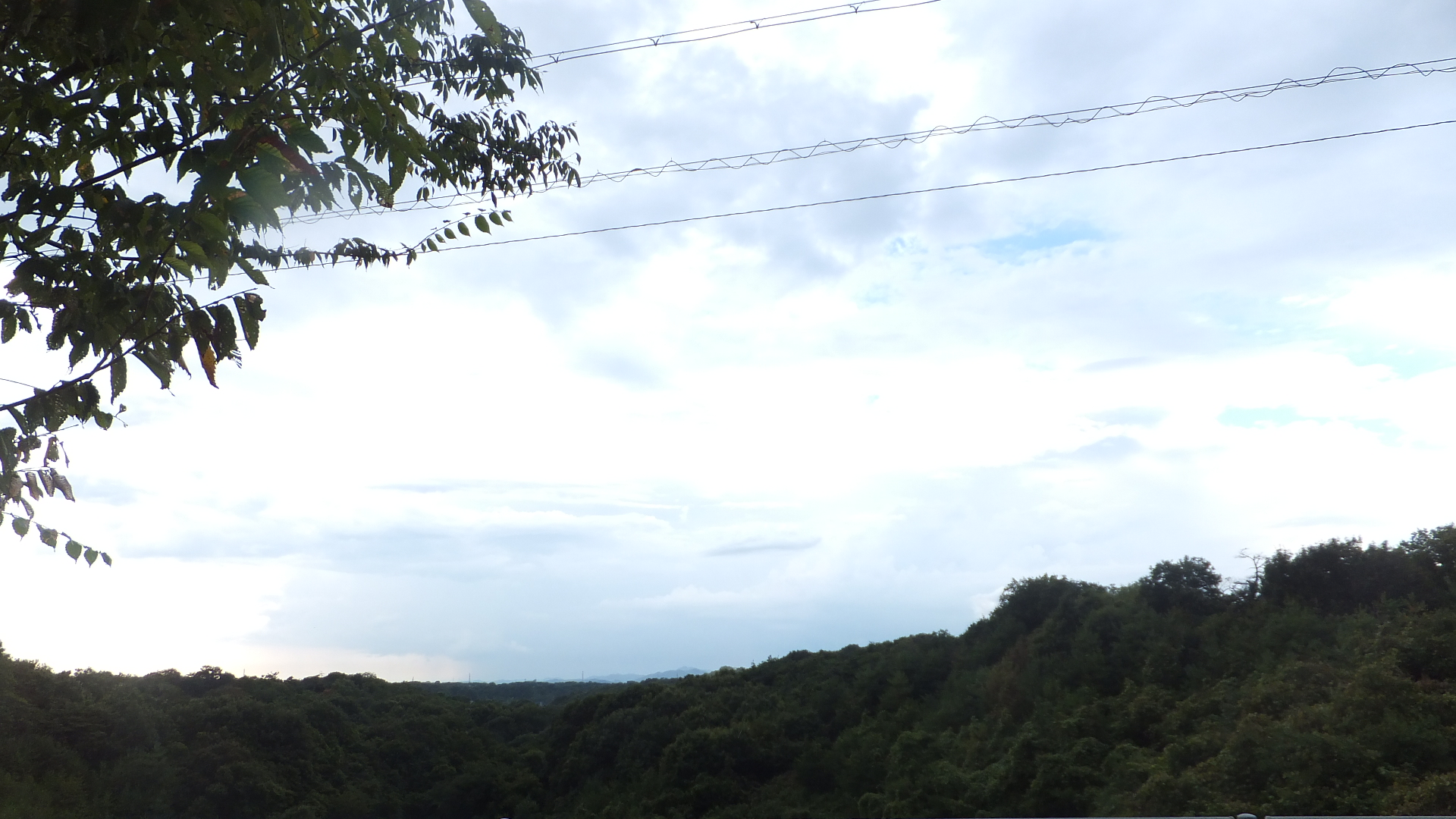 三木山国有林